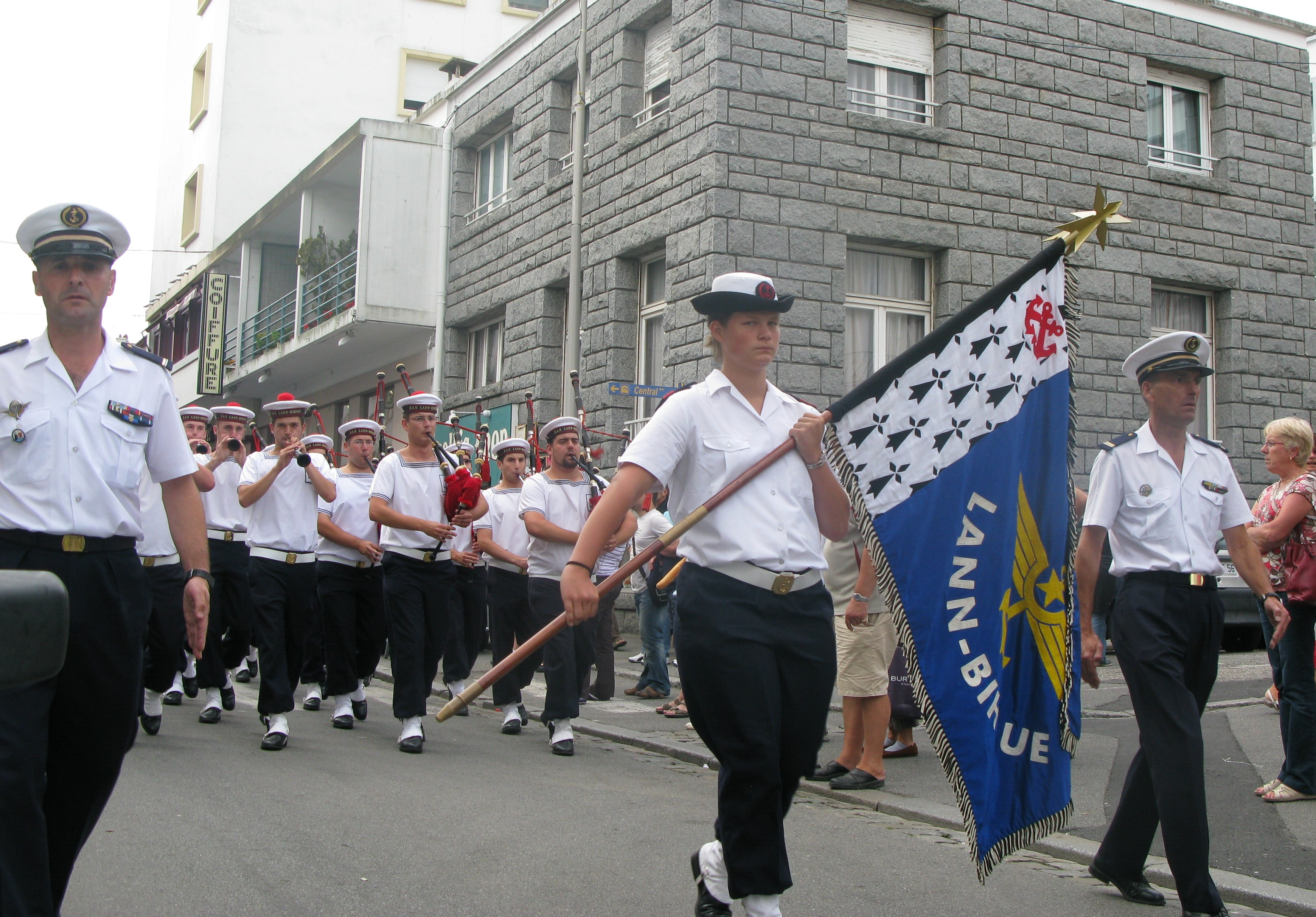 Bagad de Lann-Bihoué pendant le festival interceltique de Lorient 2009